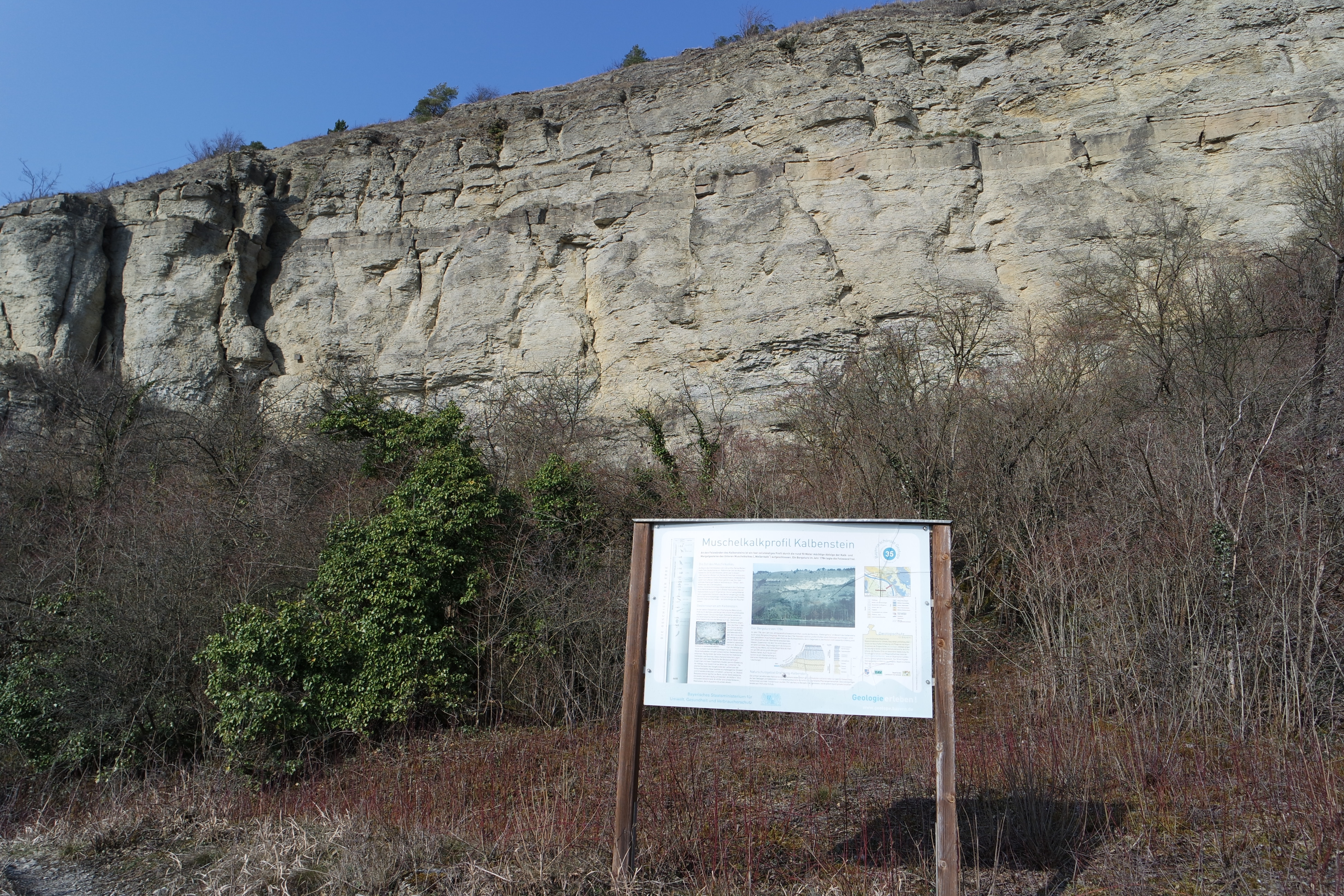 Kalbenstein nördl. Karlstadt - Bild vom Aufstieg durch das Bergsturzgelände